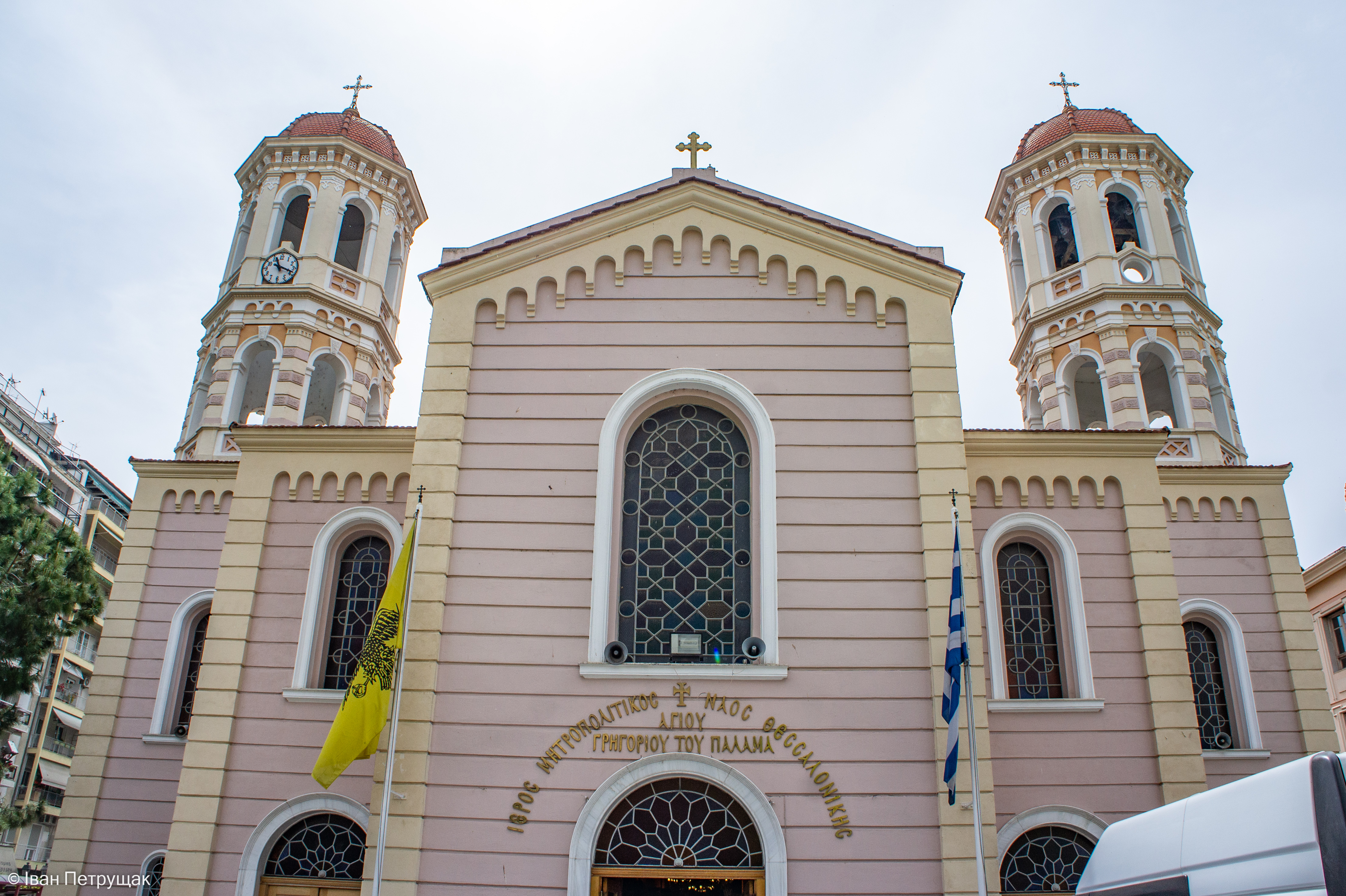 Храм святого Григорія Палами у Фесалоніках